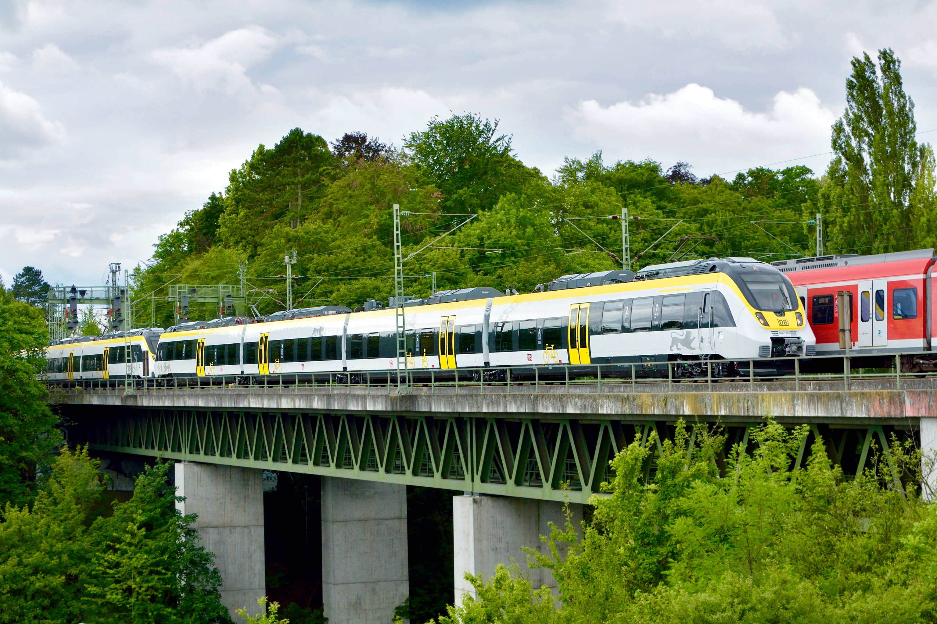 Zug der Baureihe 3442 auf der Gäubahn bei Stuttgart-Vaihingen. Die Züge sollen bis zur Fertigstellung von Stuttgart 21 im Halbstundentakt zwischen Stuttgart und Horb, sowie im Zweistundentakt weiter nach Rottweil und Freudenstadt verkehren. Foto zur ausdrücklichen Veröffentlichung unter CC-Lizenz mit Übertragung aller Rechte bereitgestellt von Herrn U. Schnell, Stuttgart.